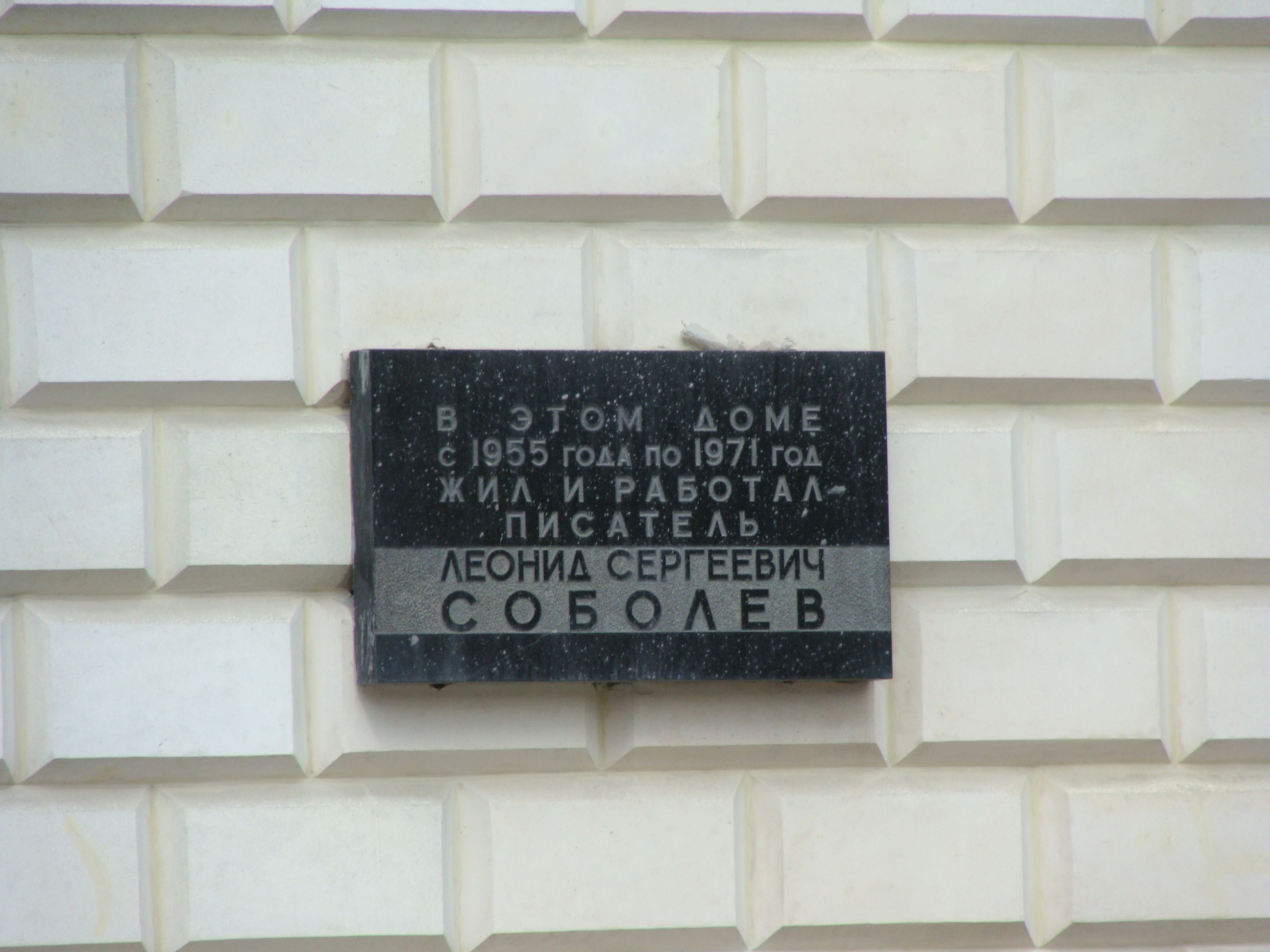 Sobolev_memorial_desk_Moscow